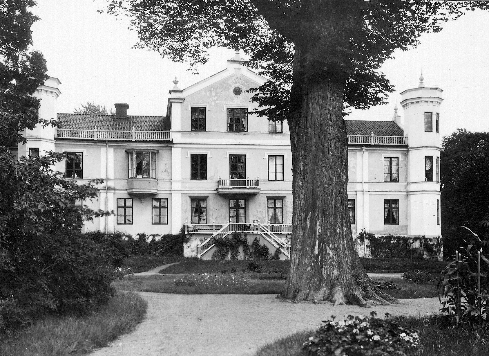 Vårby gårds huvudbyggnad ca 1910